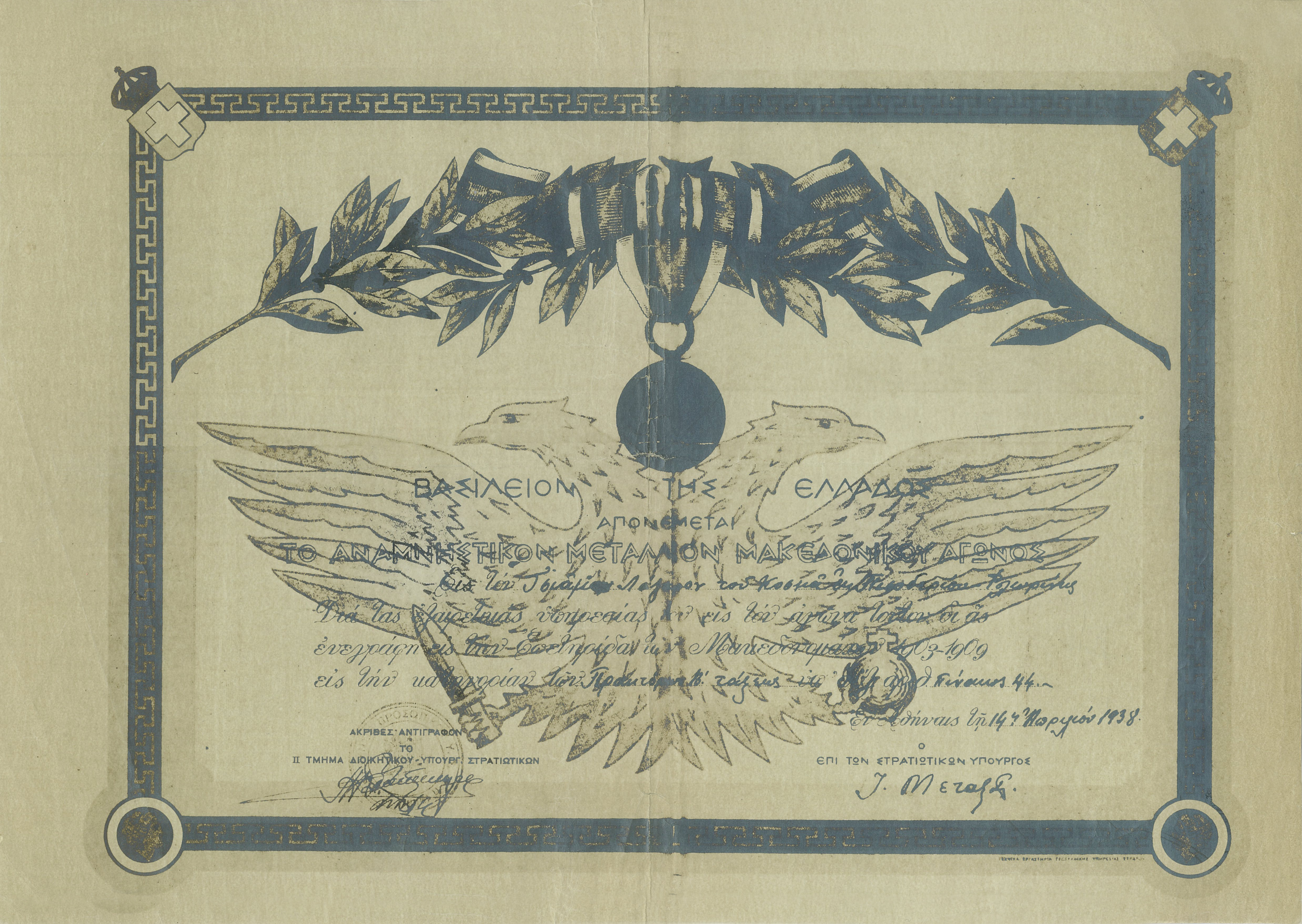 Δίπλωμα απονομής μεταλλίου Μακεδονικού αγώνα